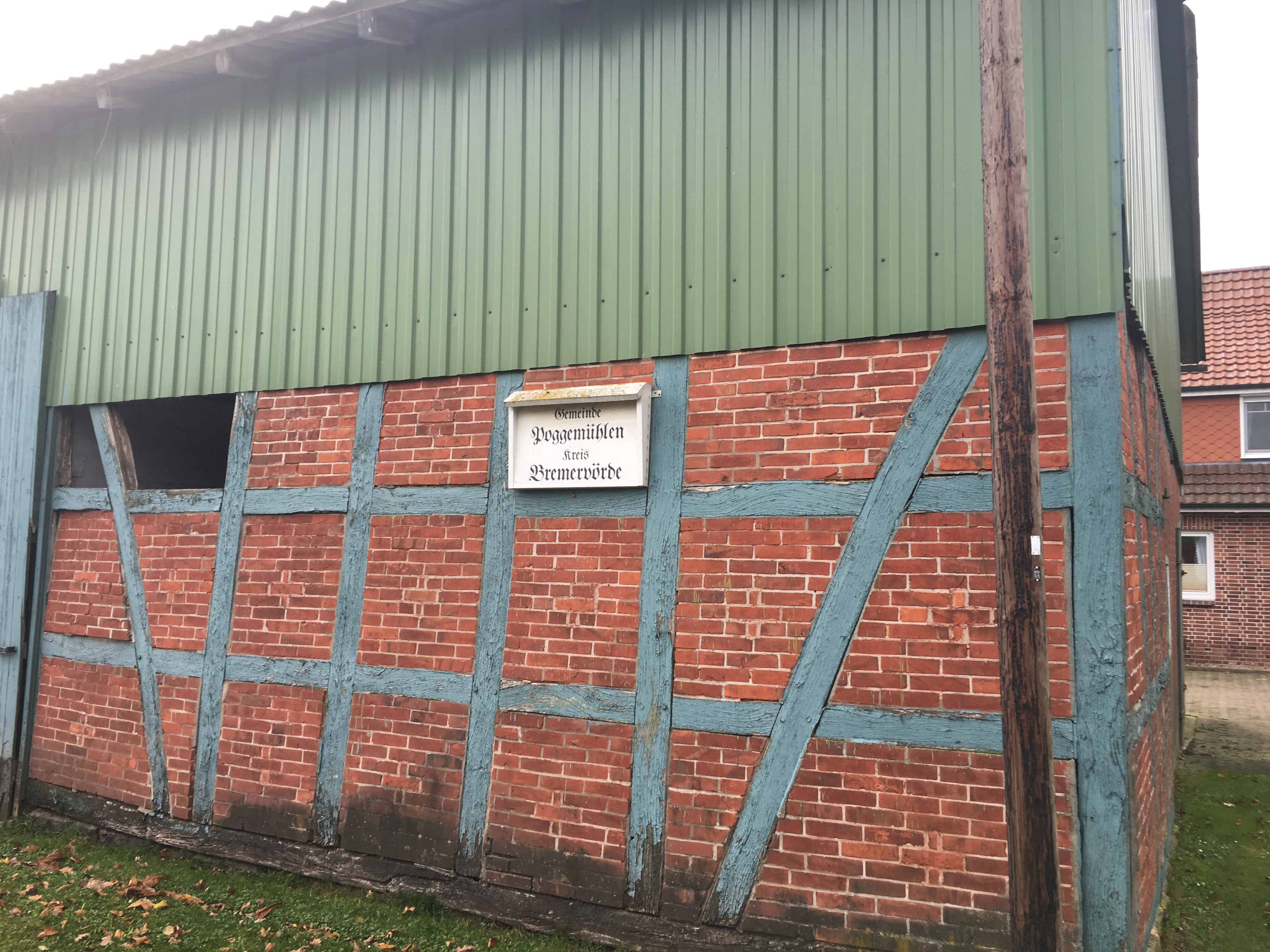 Schild Gemeen Poggmöhlen, Kreis Bremervöör an en Schüün in Poggmöhlen